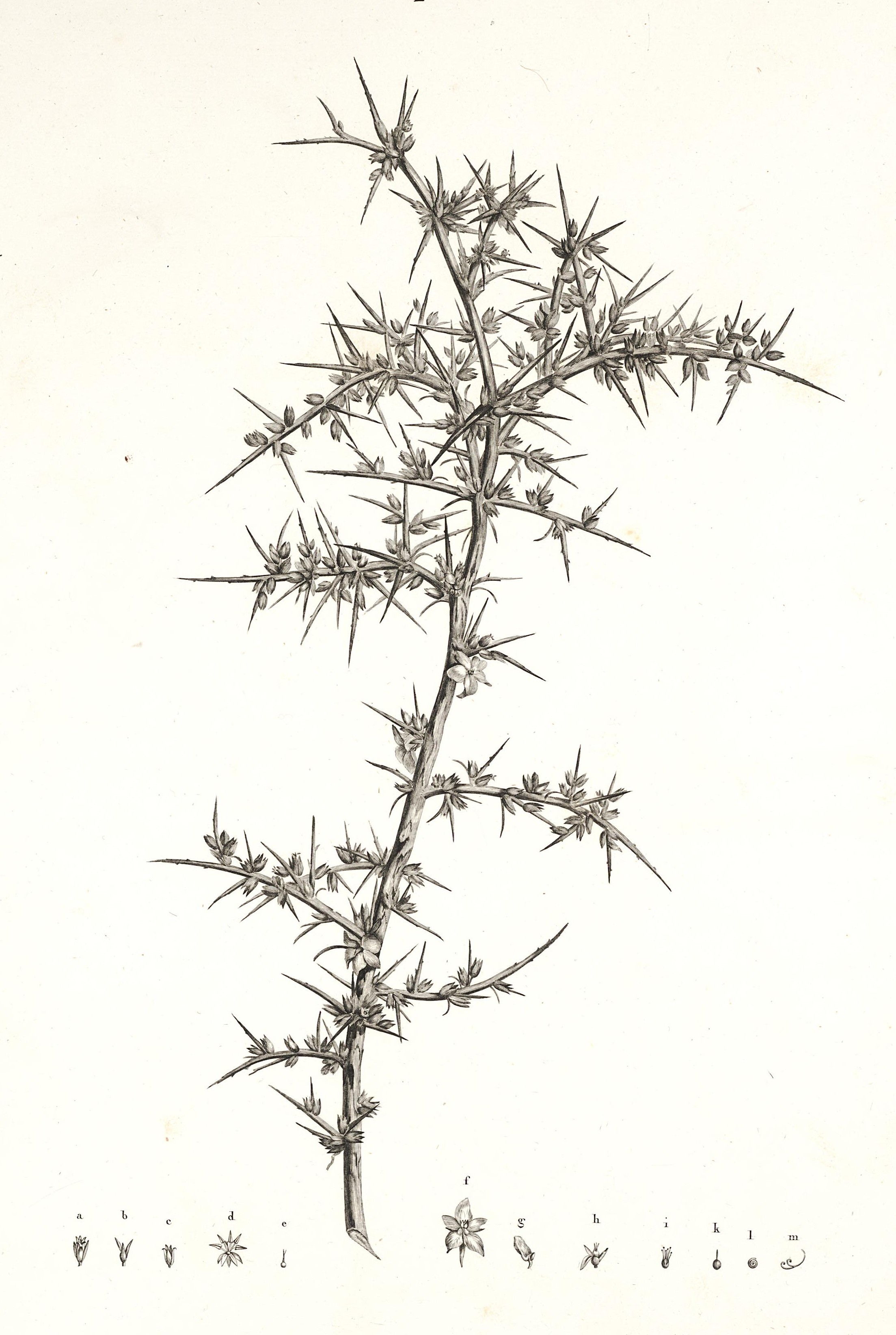 Salsola echinus = Noaea mucronata, from Description de l'Égypte. Histoire naturelle. Botanique, 1813–1814. Plate 21 (part)